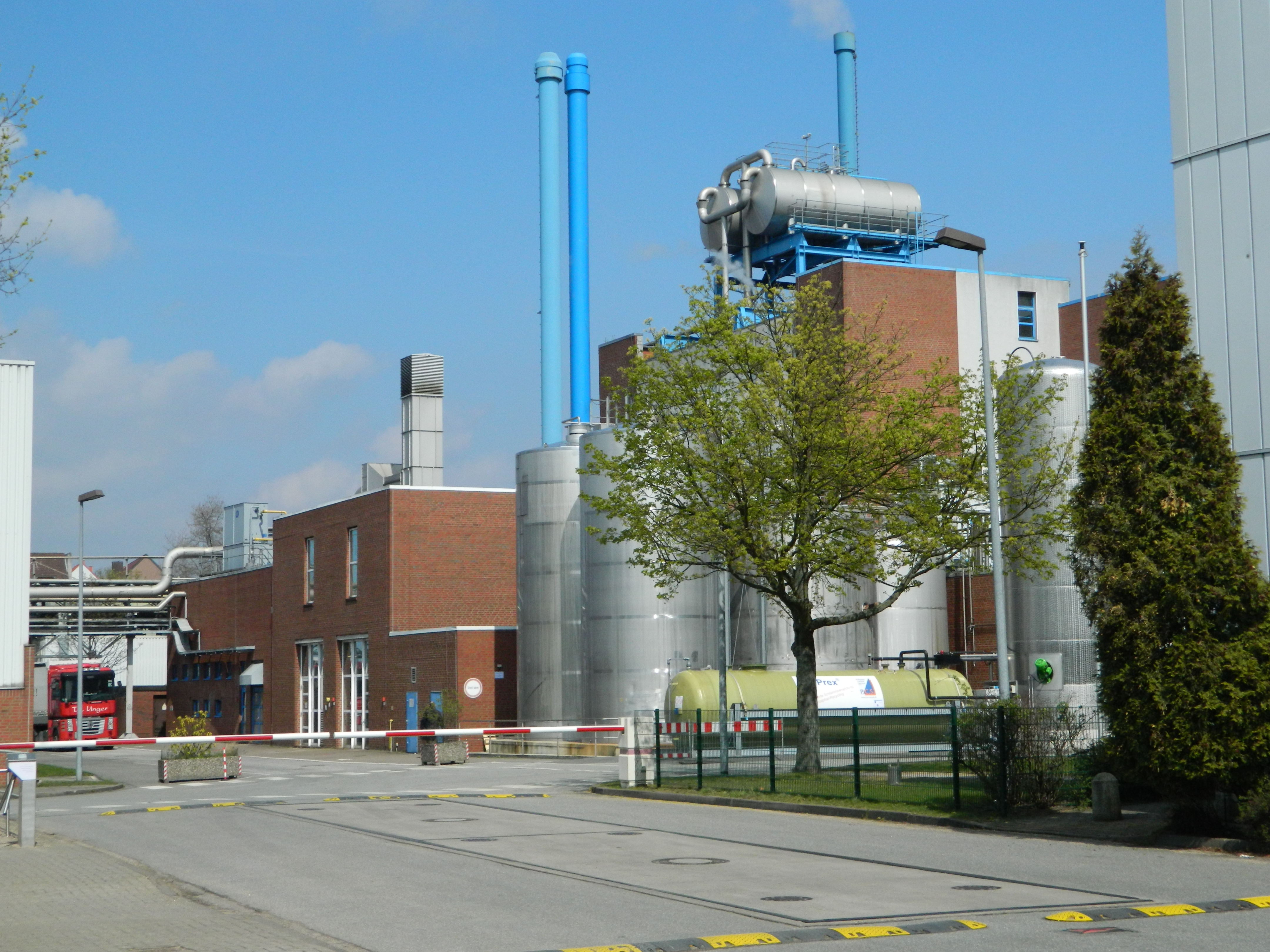 Hefewerk